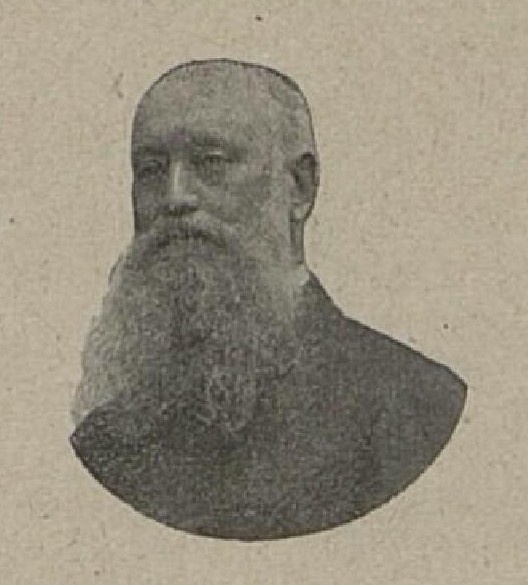 Ferdinand August Spiegel-Diesenberg (1850-1913), moravský šlechtic, velkostatkář a poslanec Moravského zemského sněmu